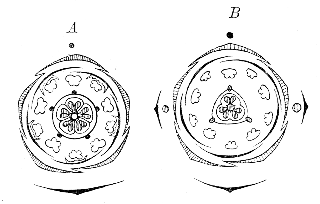 Flower diagrams of Caryophyllaceae; left: Lychnis (former Viscaria) (Scheidewände im unteren Teil des Fruchtknotens), right: Silene (Scheidewände fehlen).